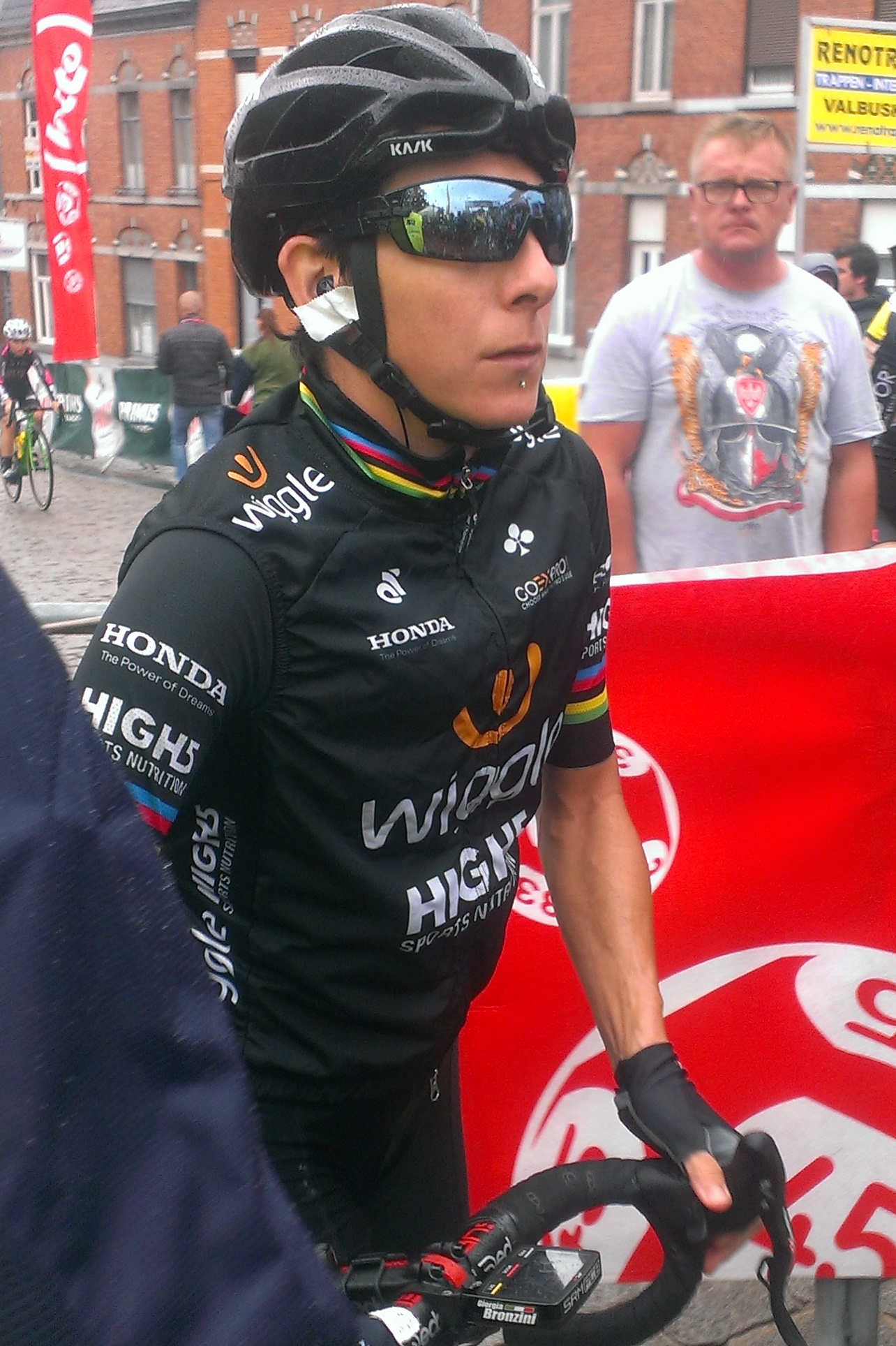 Start van de 3e en laatste etappe van de Lotto Belgium Tour 2017 in Geraardsbergen.